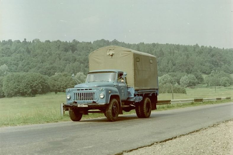 Грузовое такси. Дачные перевозки. 1981 год.